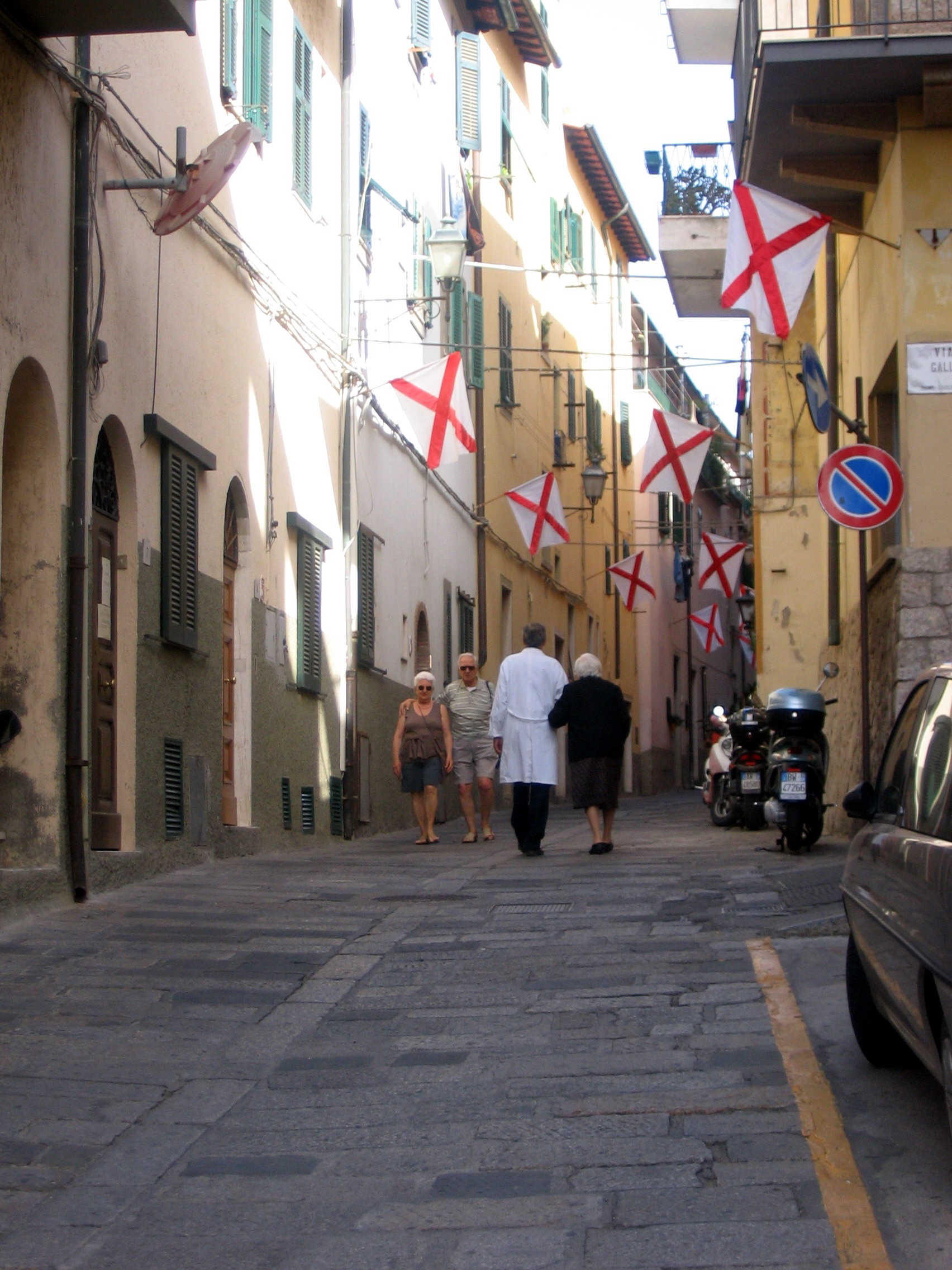 Porto Santo Stefano, Toscana, Italia